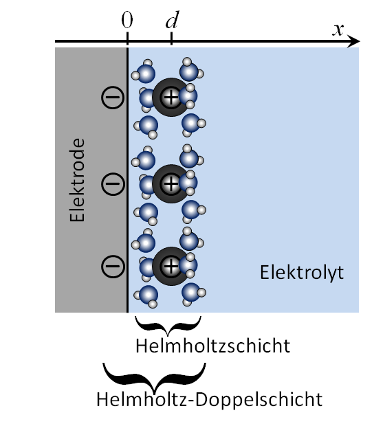 Schema einer Helmholtz-Doppelschicht mit negativer Ladung in der Elektrode. Die Kationen auf der Lösungsseite sind hydratisiert.